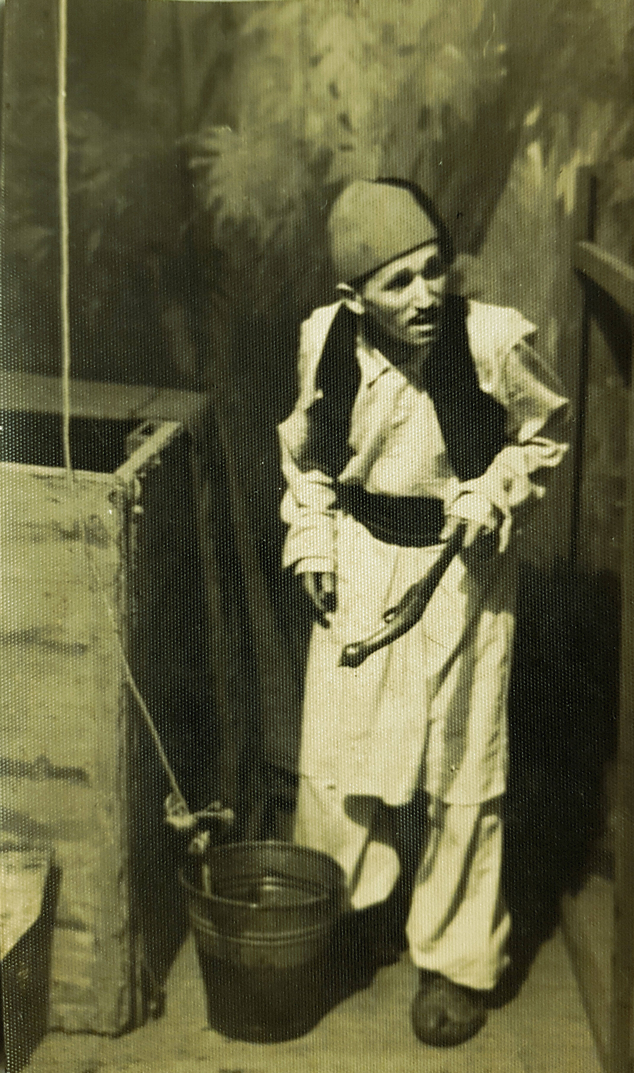 На бунару